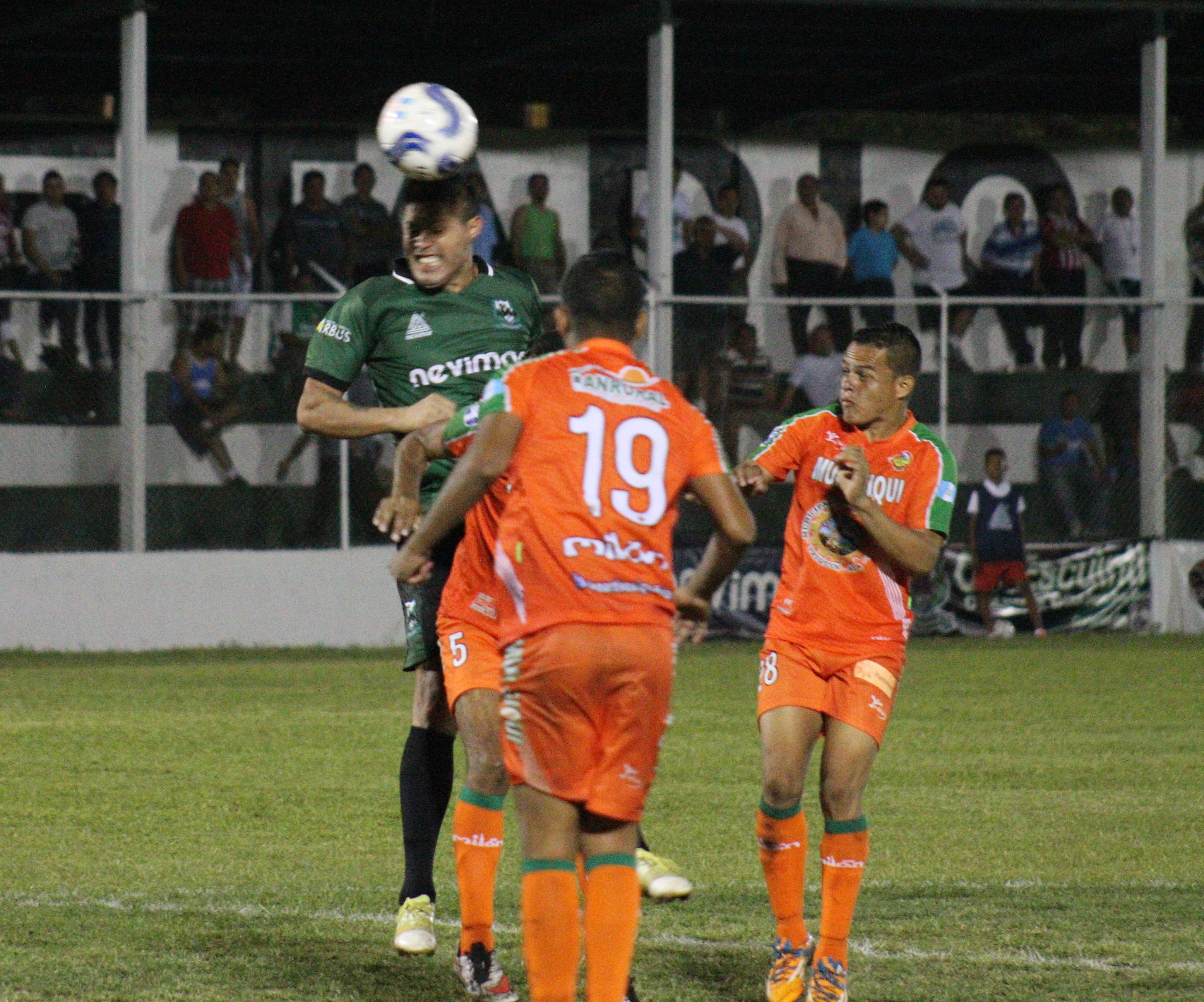 Paulo Centurión en lo alto haciendo daño en el área rival.